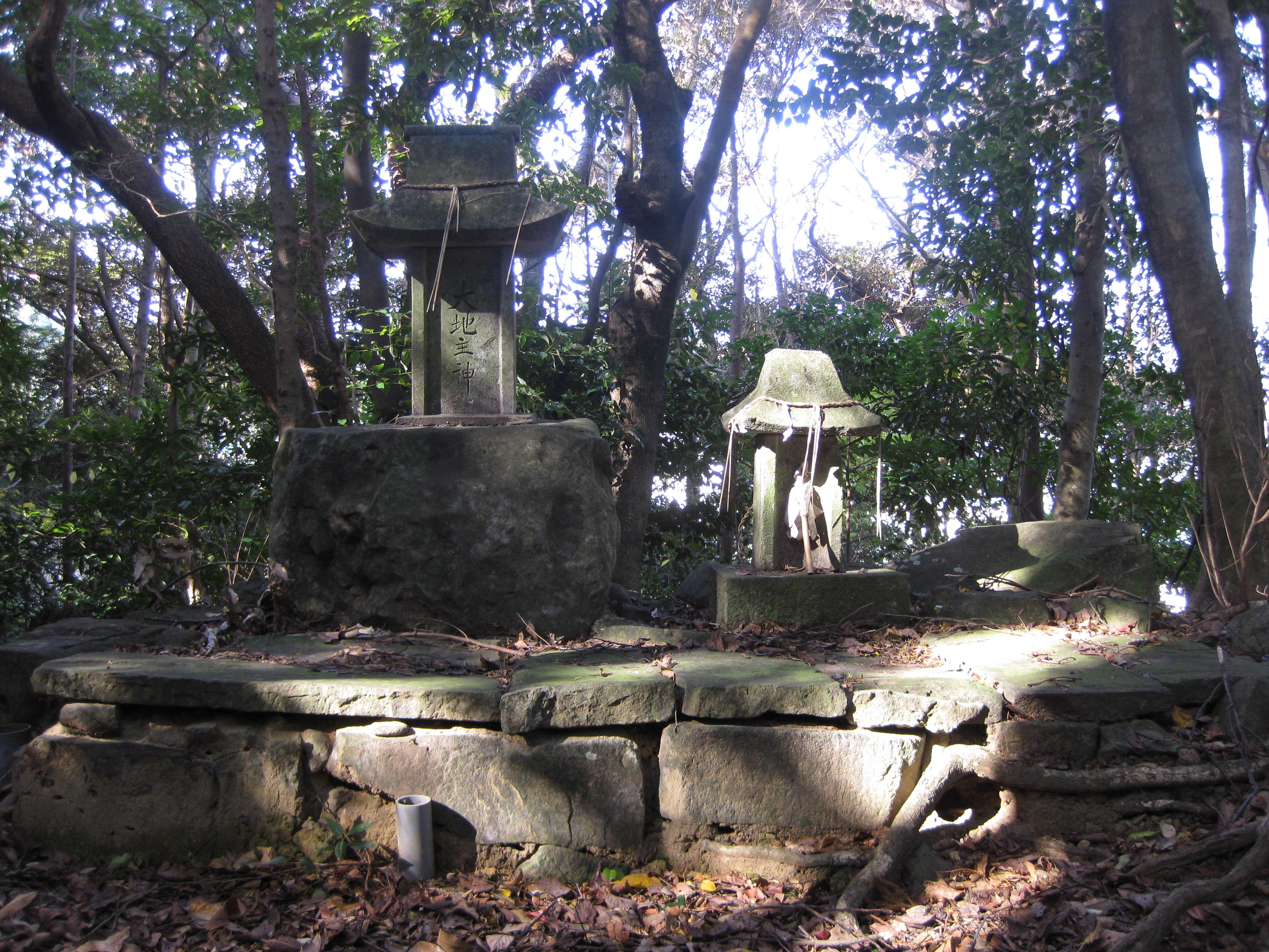 新上五島町 大地主神社